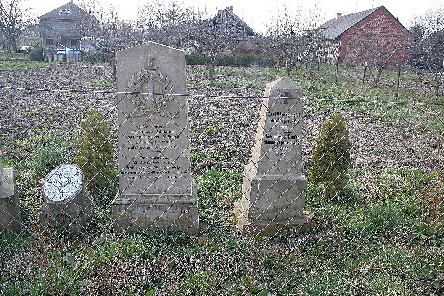 Pomníky padlých z bitvy u Hradce Králové roku 1866 v Horních Dohalicích